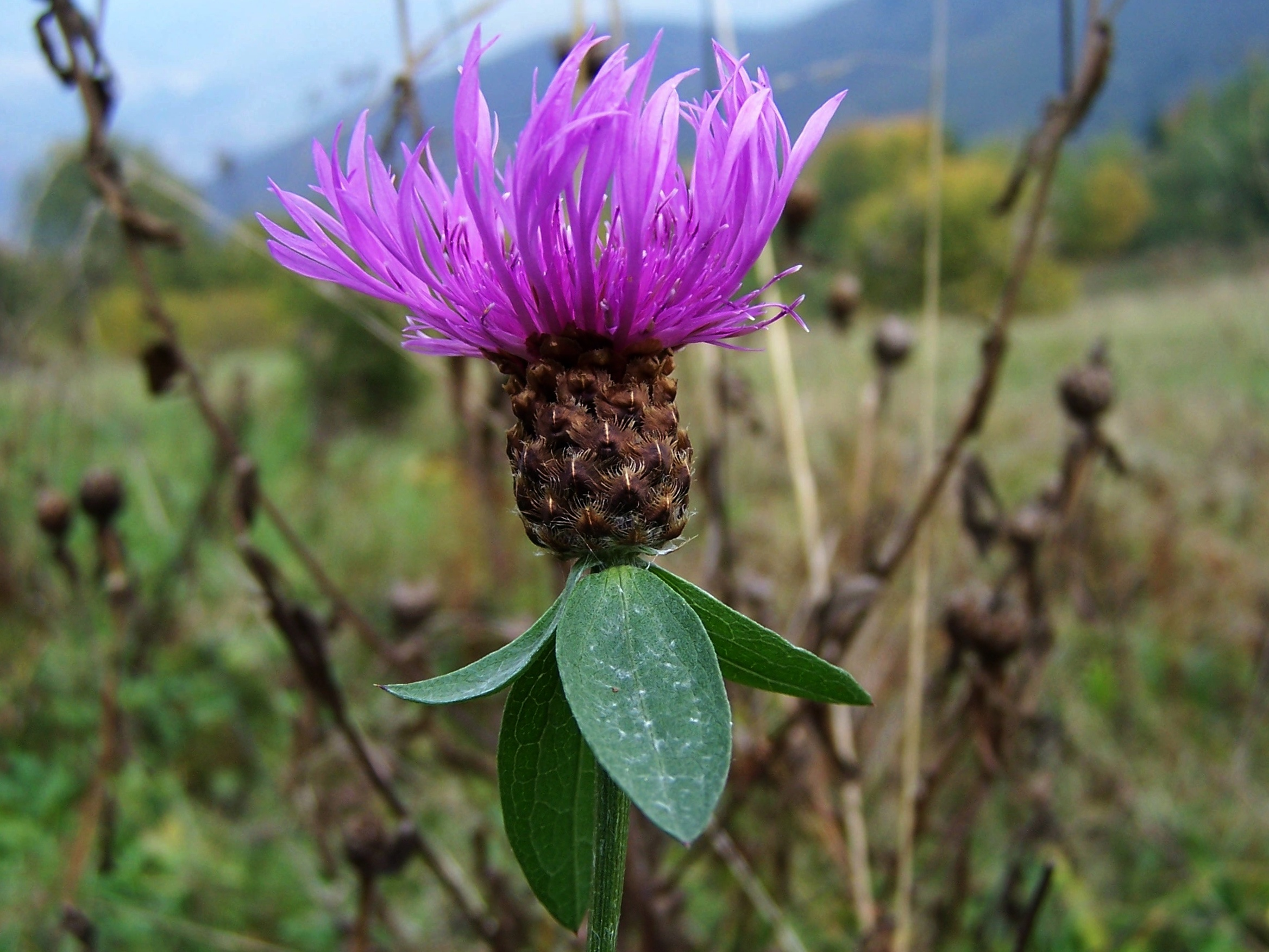 Centaurea jacea